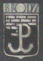 Odznaka brygardy dywersji bojowej AK "Broda 53" (pochodzi z tablicy pamiatkowej umieszczonej w kościele św. Jacka w Warszawie)